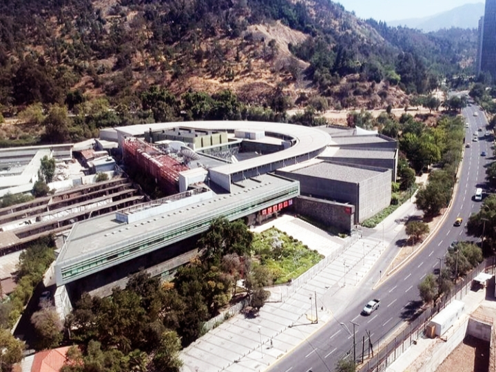 Vista aérea del edificio corporativo de Televisión Nacional de Chile en Santiago.